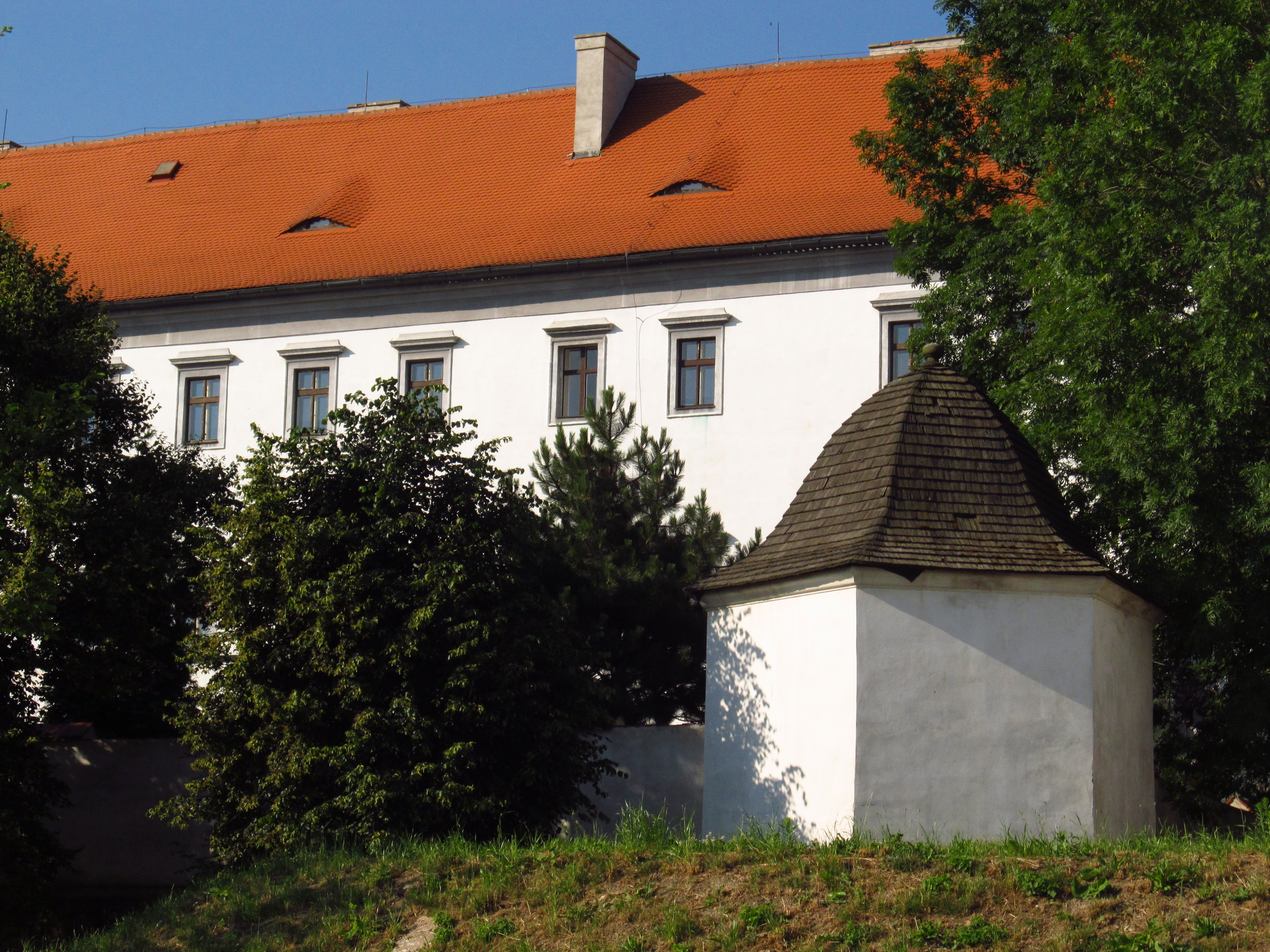 Zámek Lovosice, Lovosice 1